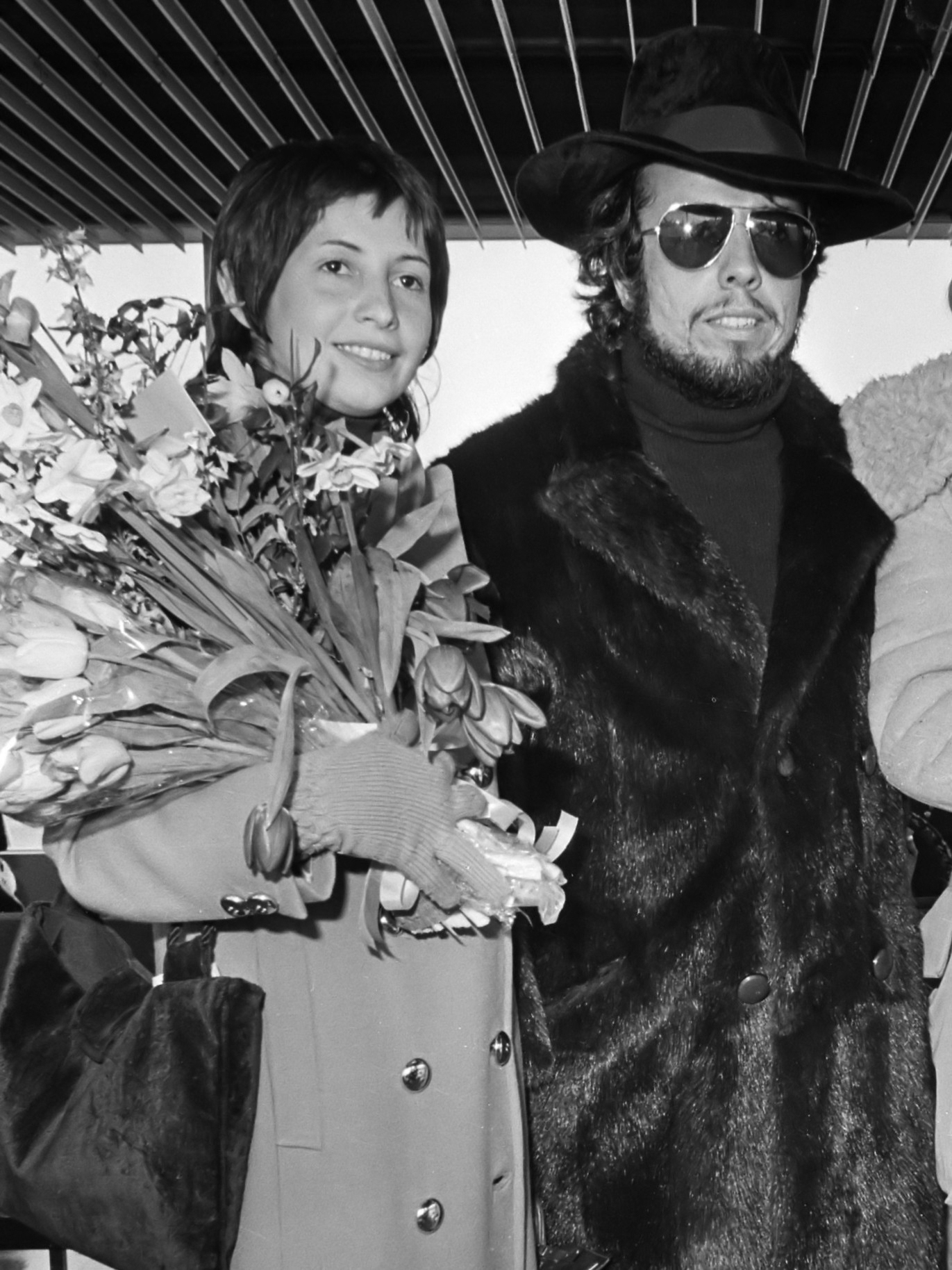 Aankomst van de Braziliaanse muzikant Sergio Mendes en zijn groep op Schiphol; Sergio Mendes en Gracinha Leporace 5 maart 1971